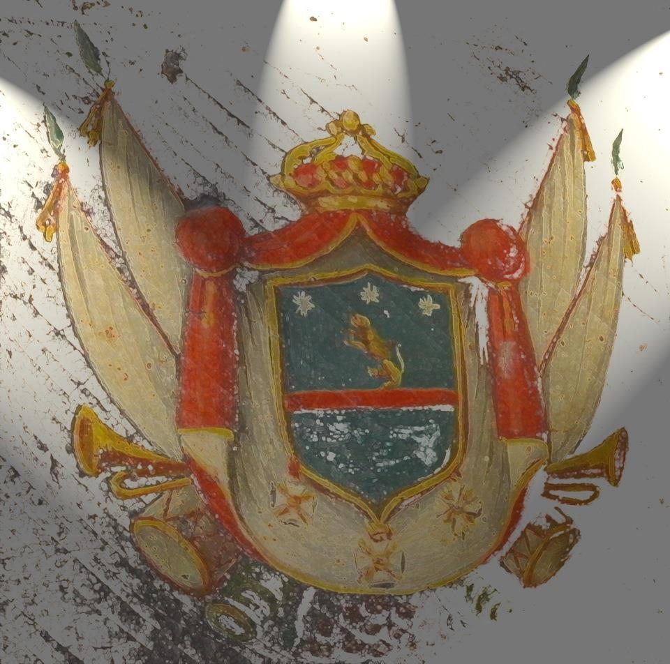 Stemma dei Marchesi Sarlo in Calabria